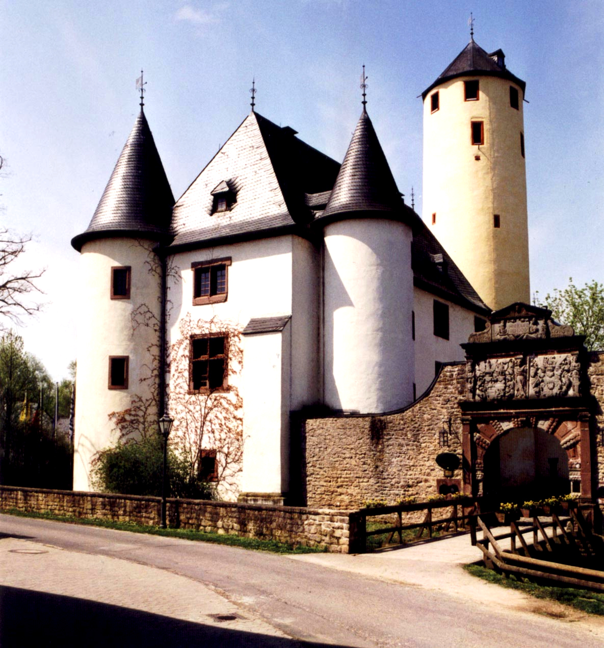 Burg Rittersdorf, Palas aus der Zeit von 1550, Bergfried um 1290, Wappentor von 1575